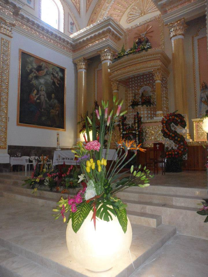 Vista del altar mayor de la parroquia Jesús de las Maravillas, decorado en láminas de oro.